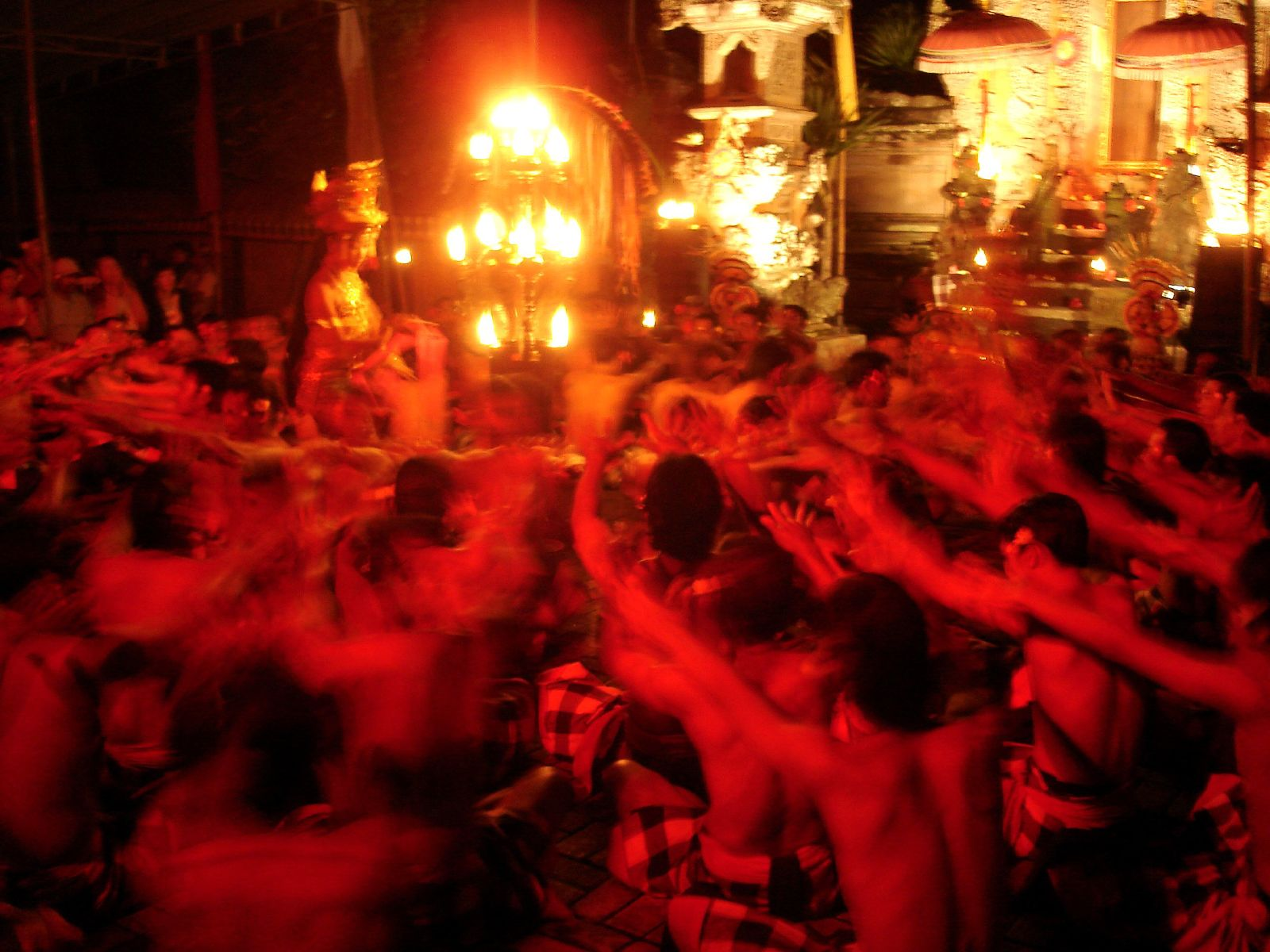 Kecak fire dance in Bali.Kecak fire and trance dance